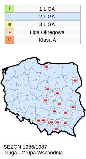 Jagiellonia w sezonie 1986/87 mapa